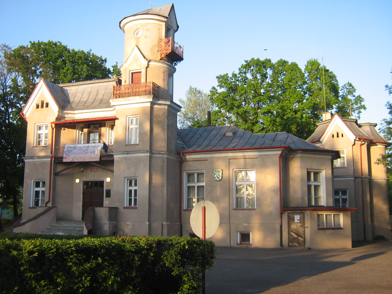 Pałacyk Chrzączewskich w Wierzbinku